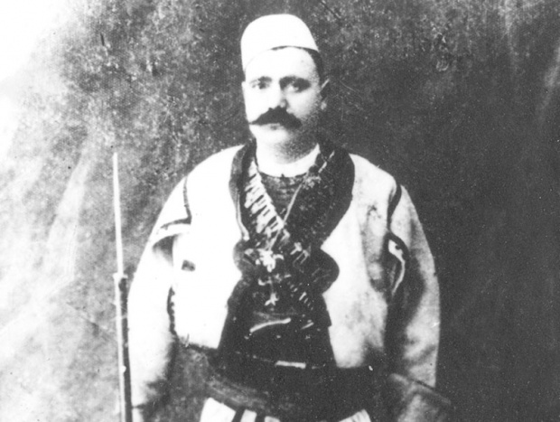 Srpski (latinica): Ustanički vođa Uroš Kostić Rudinac.